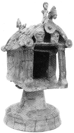 Tempietto di Sabucina o sacello di Sabucina è un modello di tempio fittile in terracotta proveniente dagli scavi della necropoli di Sabucina in provincia di Caltanissetta, vicino la città nissena, esso è sostenuto da un piedistallo e presenta decorazioni acroteriali equestri e antefisse gorgoniche.